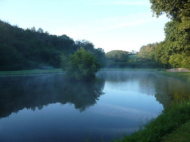 L'Aber-Ildut à Lanildut